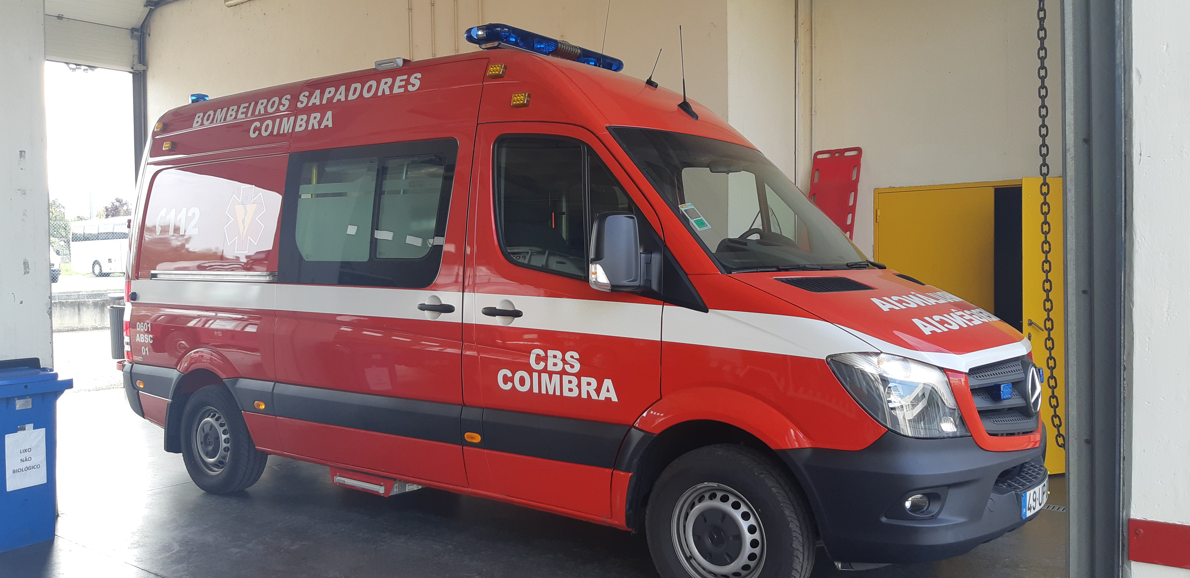 Ambulância de Socorro